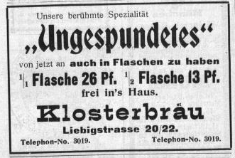 Reklame der Klosterbrauerei München AG, Liebigstraße 20-22, in der Münchener Ratsch-Kathl Nr. 95 vom 26. November 1904.